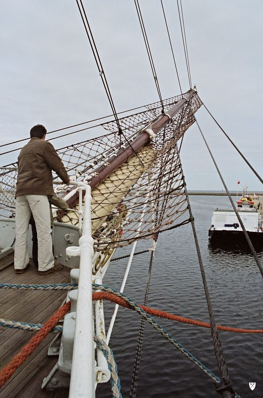 Dar Pomorza